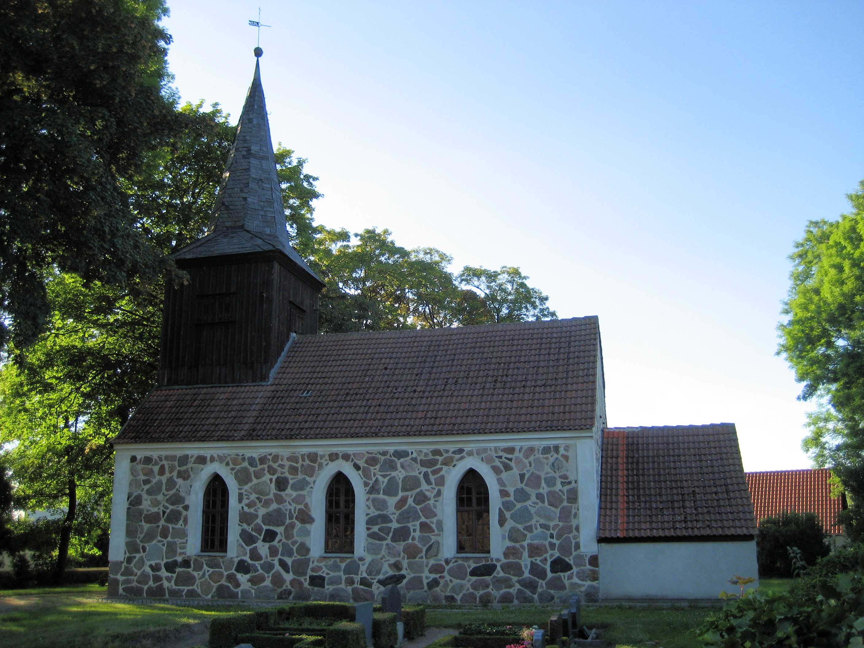 Kirche Polzow aus Blickrichtung Süden.